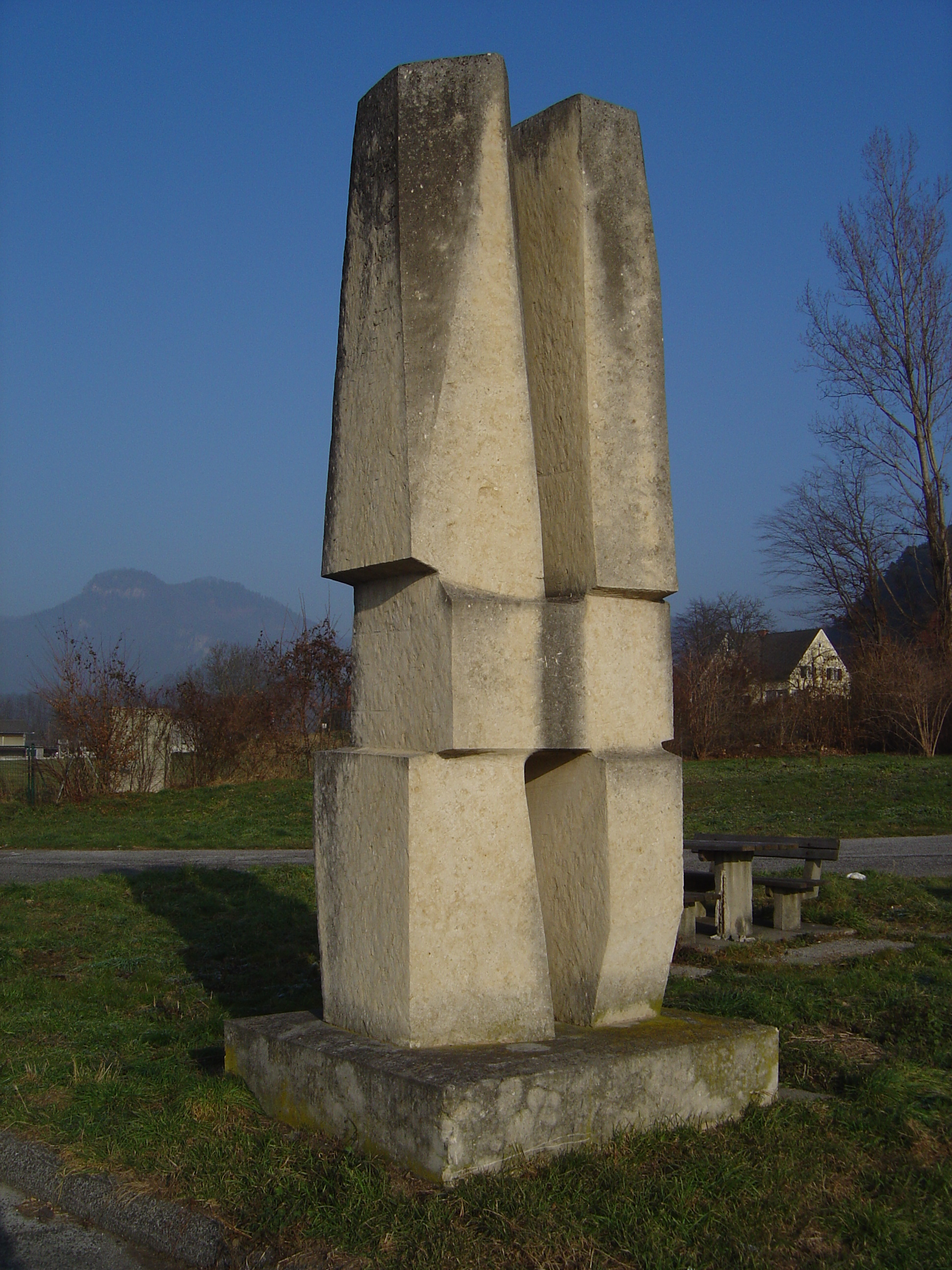 Gottfried Prabitz 1989: "Die Familie" Sandsteinskulpur Parkplatz Brucker Schnellstraße bei Frohnleiten